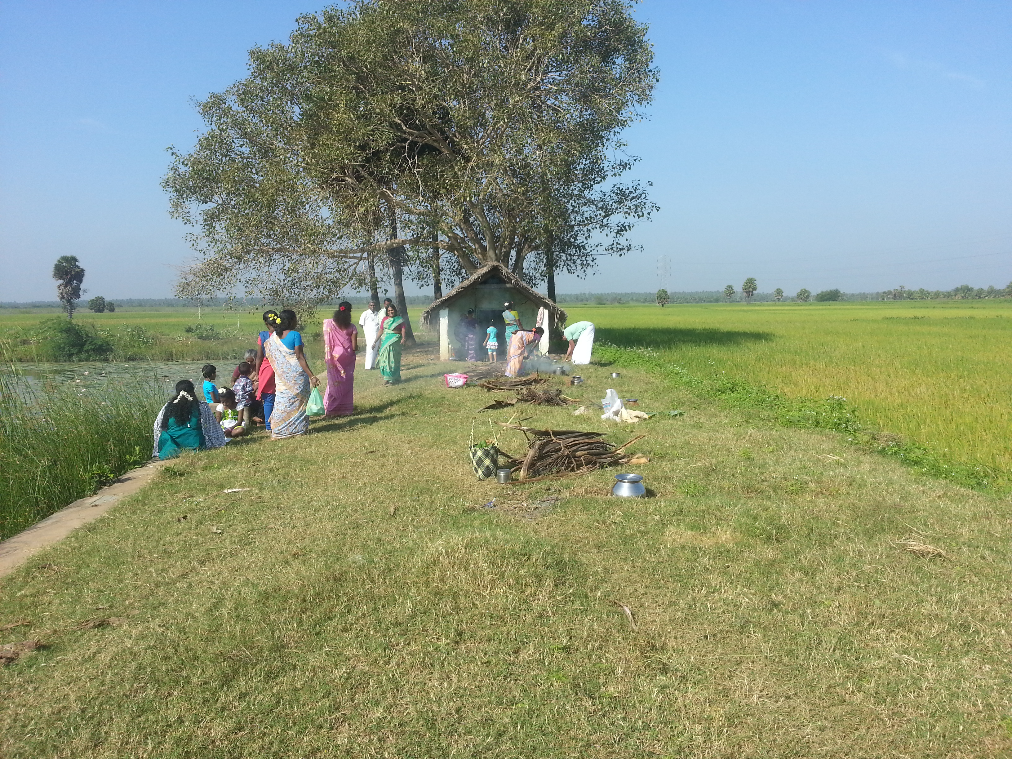 முடச்சிக்காடு அருள்மிகு சிவலிங்க சித்தி விநாயகர் கோயில், முடச்சிக்காடு